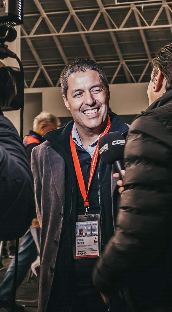 Jorge Egger junto a Gerardo Hernandez (Director Rama de Ajedrez UTA)